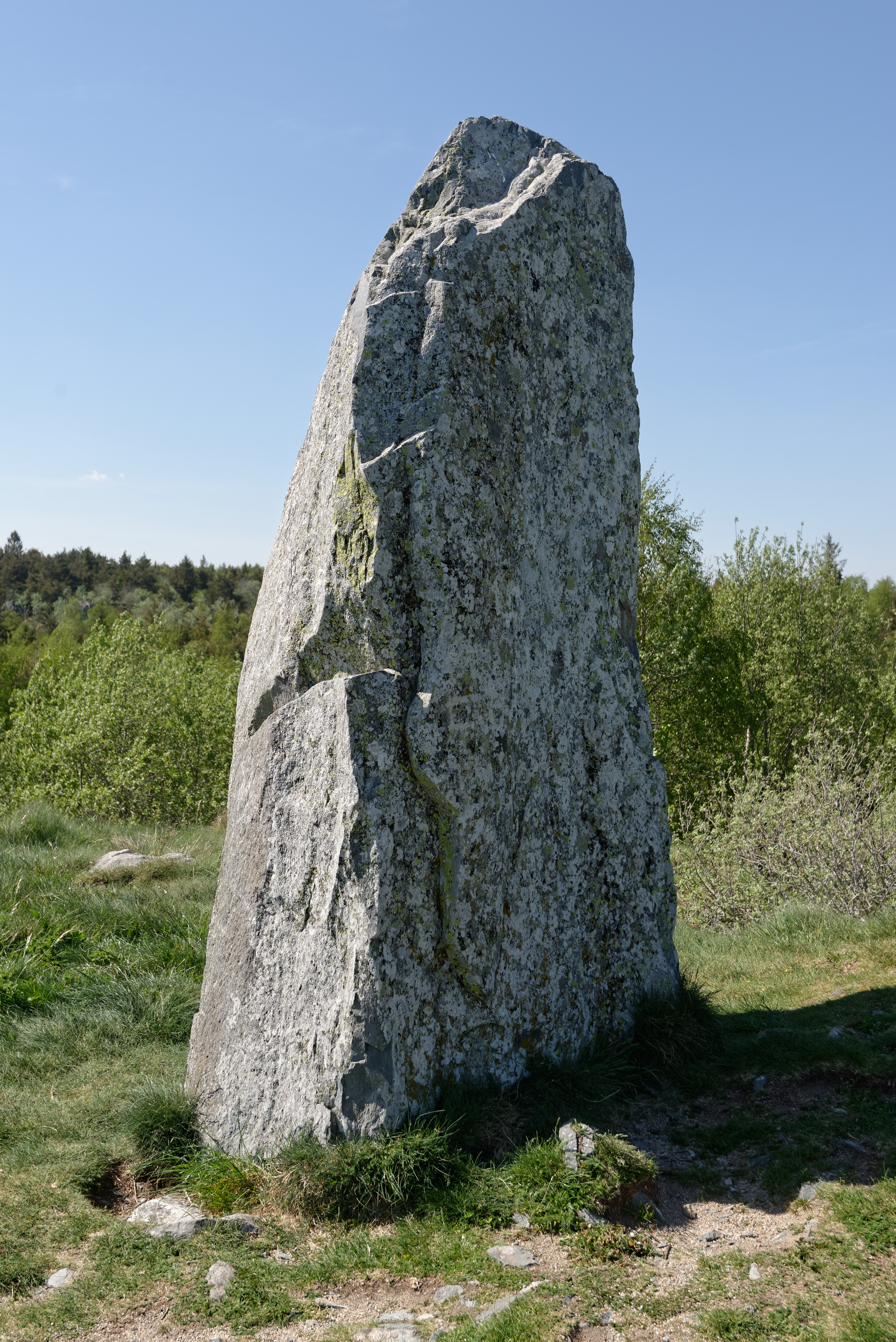 Pierre levée sur le plateau surplombant le hameau de Chièze à Araules, en Haute-Loire.